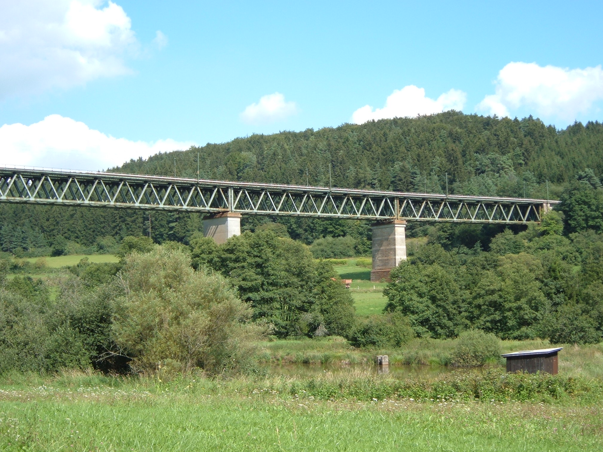 Laberviadukt südöstlich von Neumarkt in der Oberpfalz